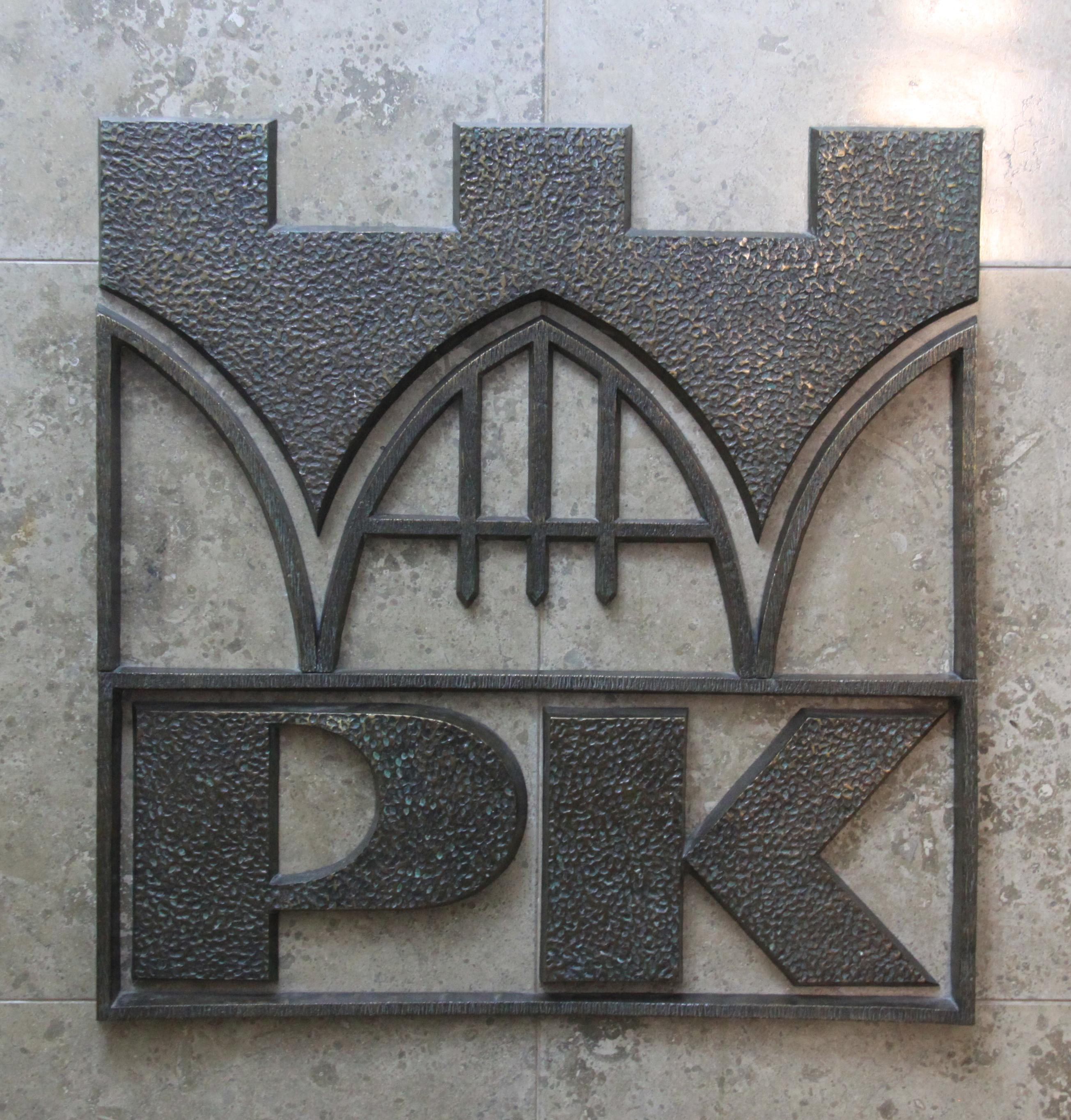 Herb Politechniki Krakowskiej